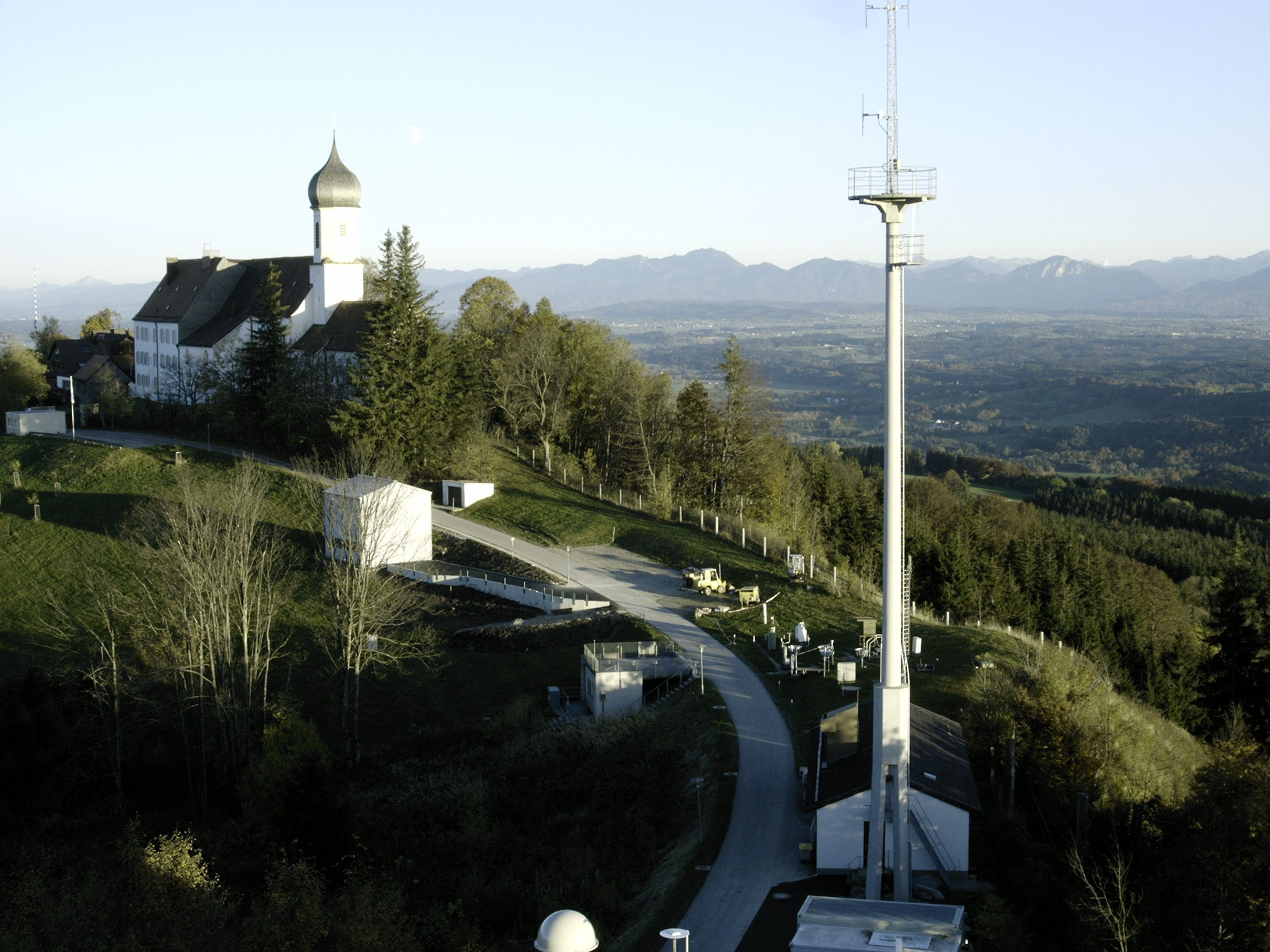 Hohenpeißenberg Observatorium Messfeld und Kloster